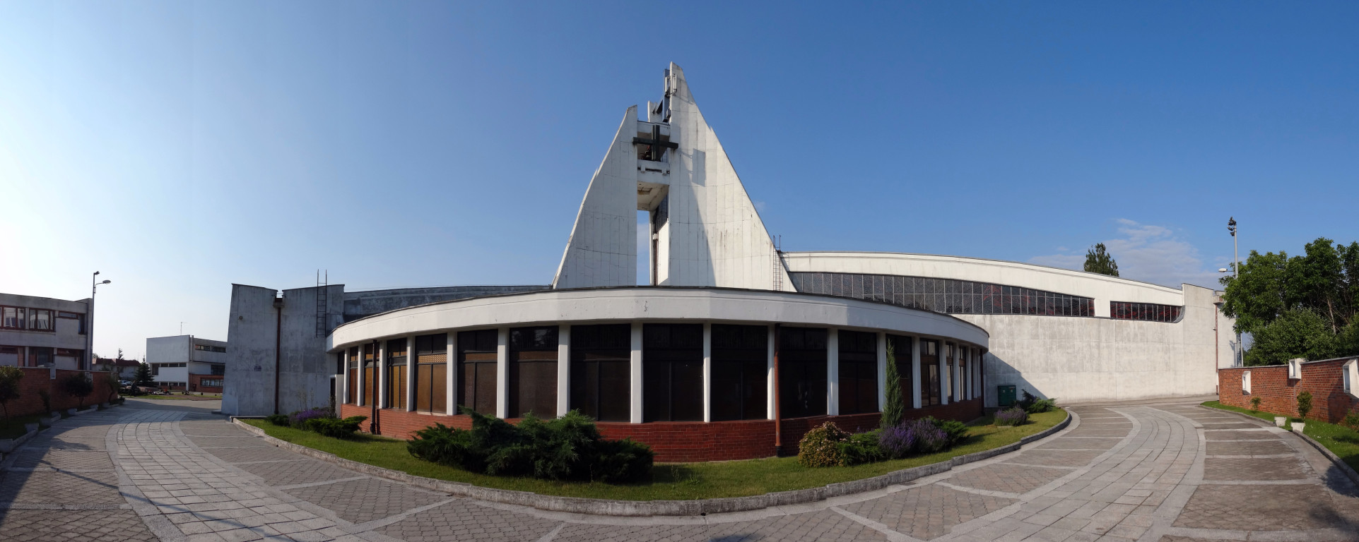 Kościół p.w. Świętych Polskich Braci Męczenników w Bydgoszczy na osiedlu Wyżyny, Sanktuarium Nowych Męczenników